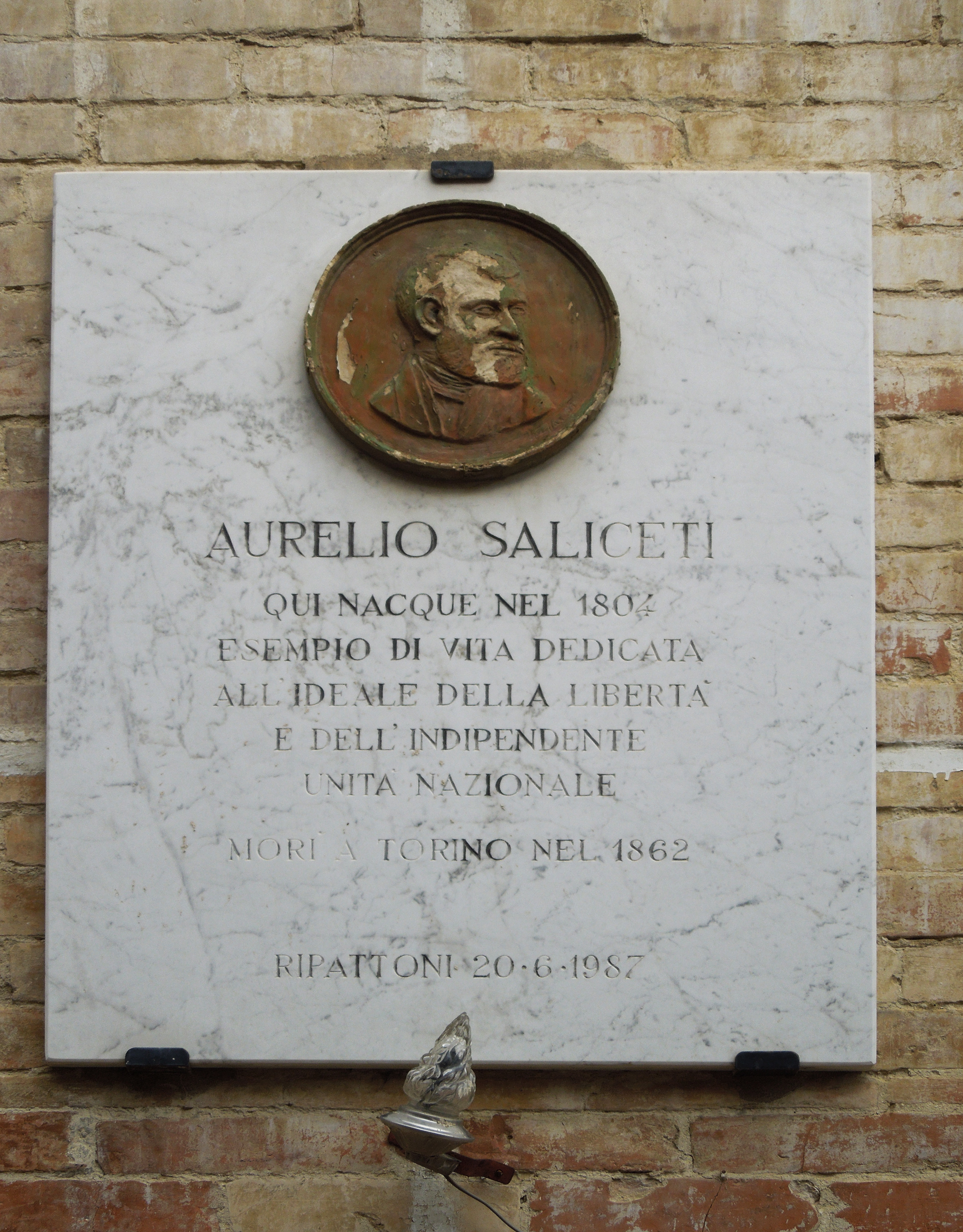 Lapide commemorativa dedicata ad Aurelio Saliceti a Ripattoni in provincia di Teramo.